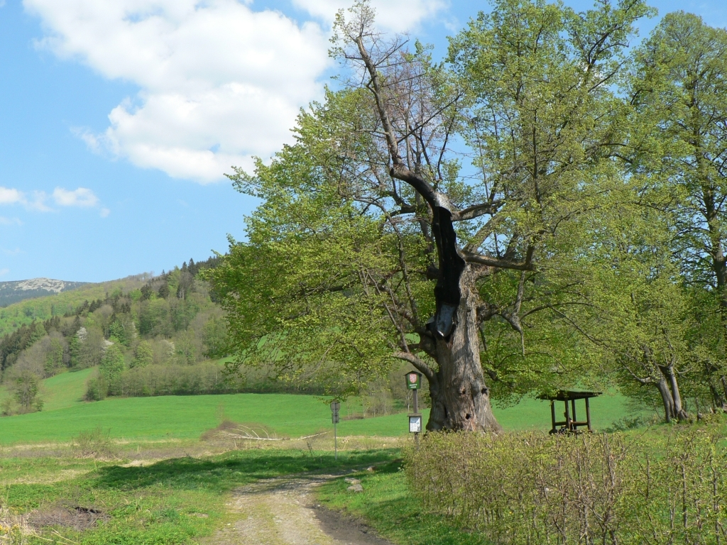 Památkově chráněná lípa ve Vernířovicích.